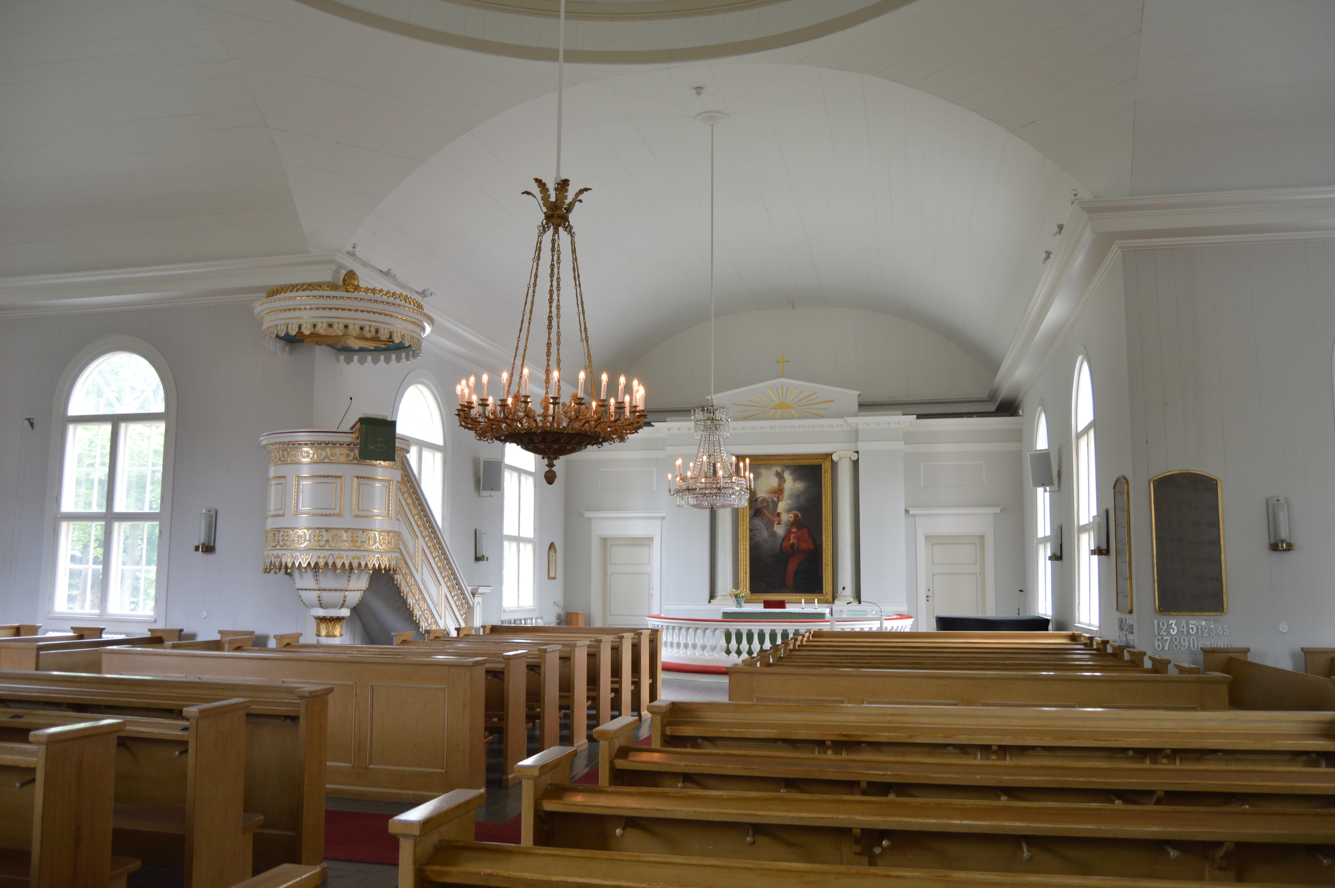 Tampereen vanha kirkko